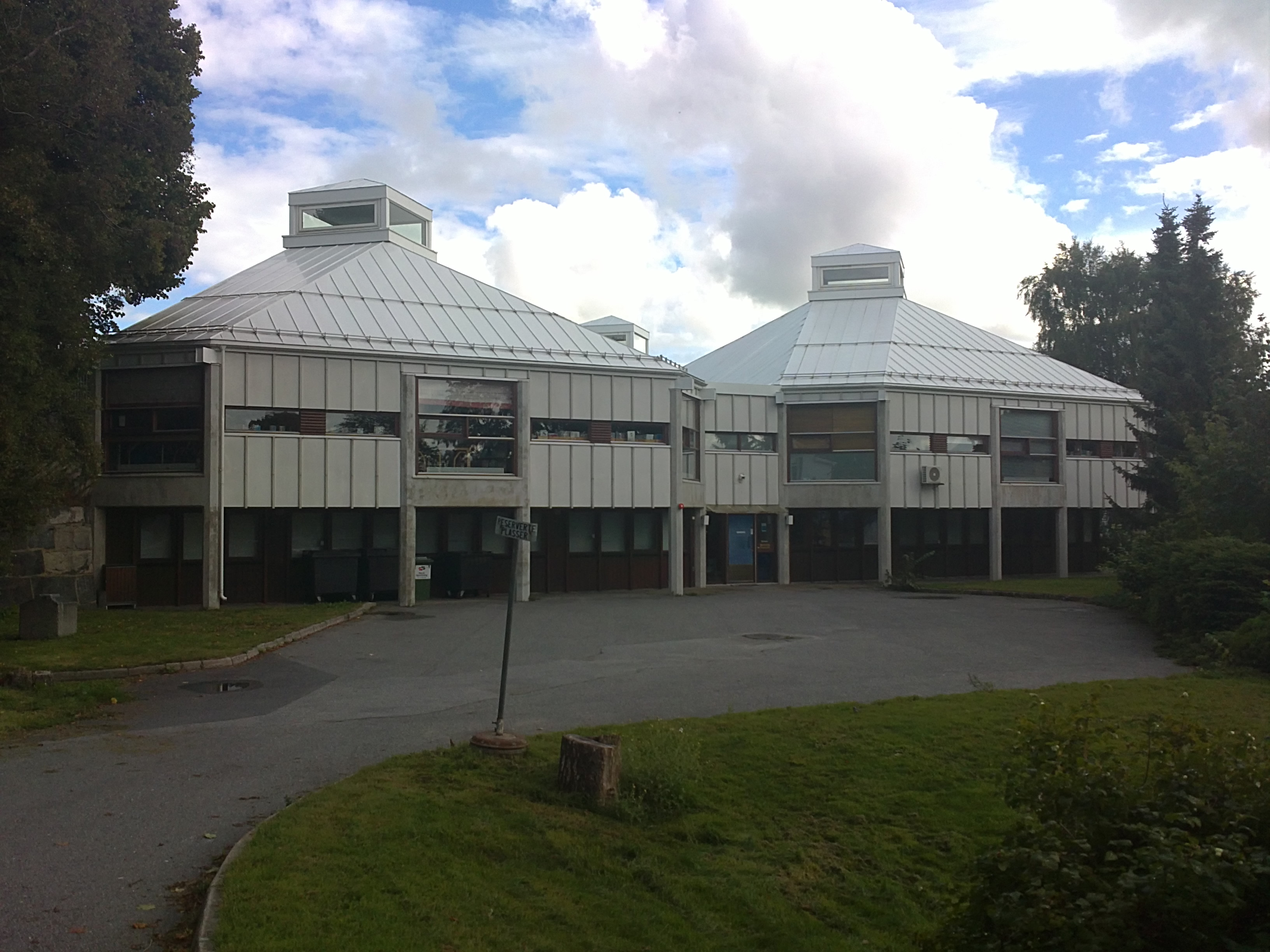 Bilde av Larvik bibliotek